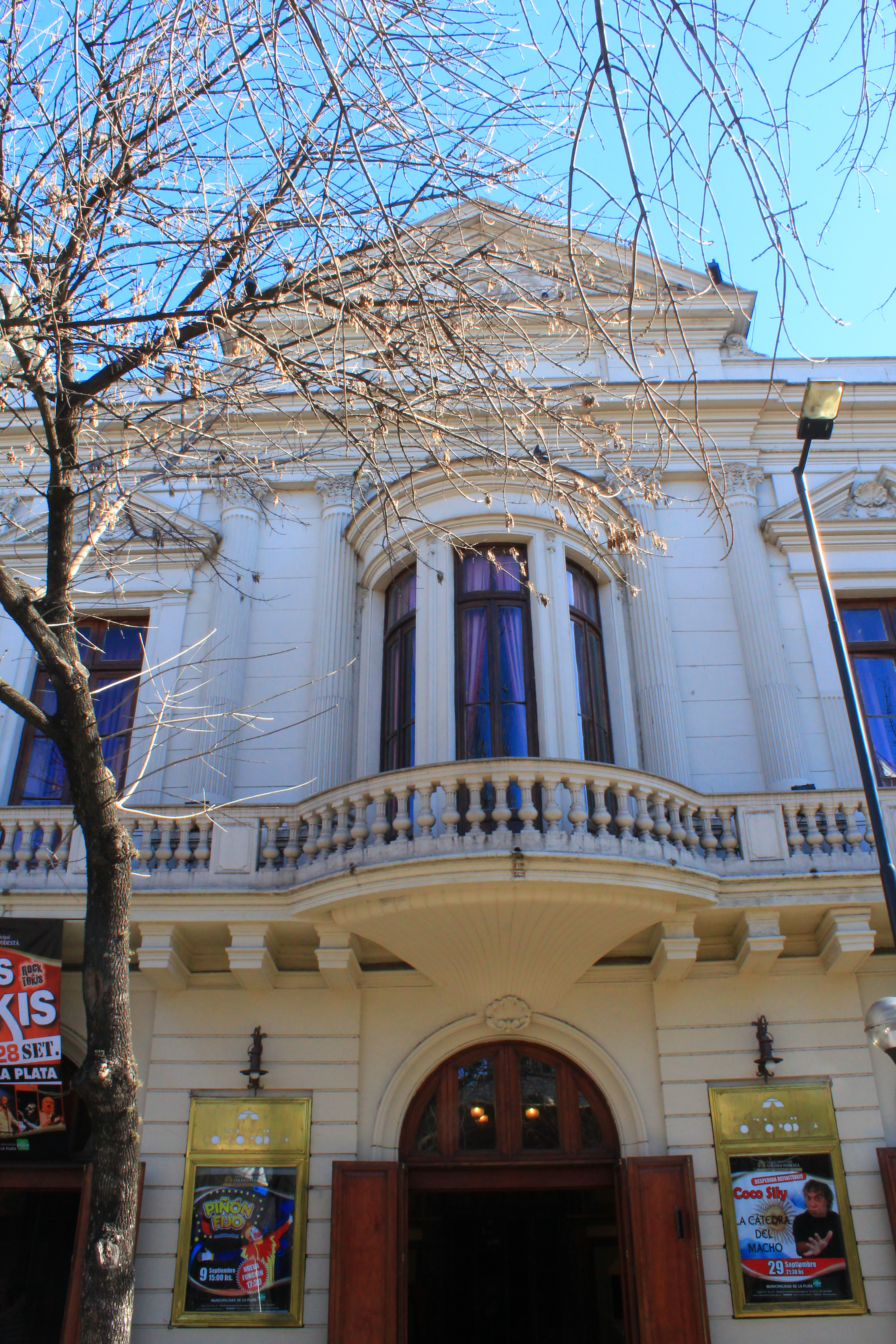 Teatro Coliseo Podestá